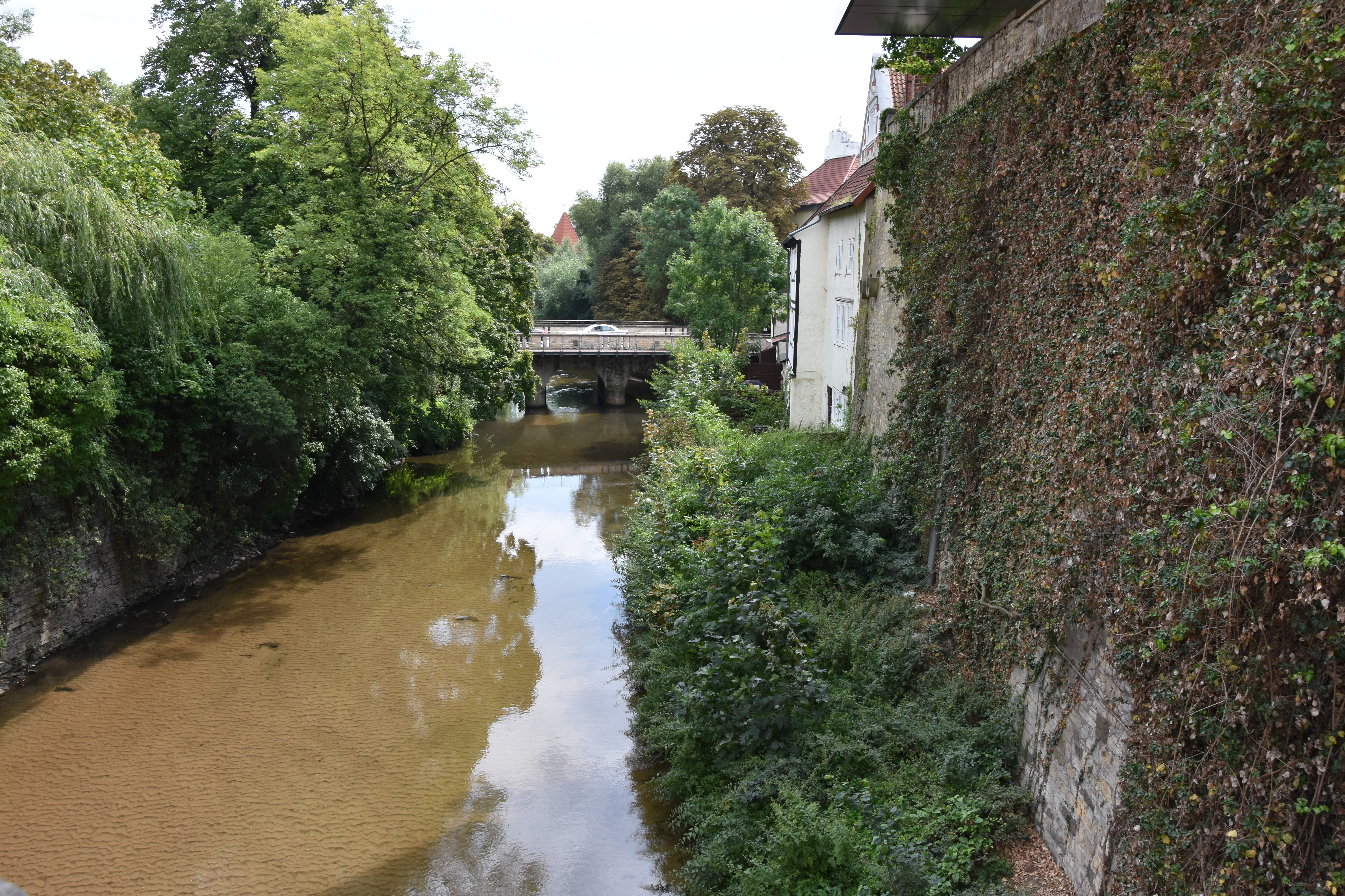 Hase an der Vitischanze. Blick von der Hohen Brücke.